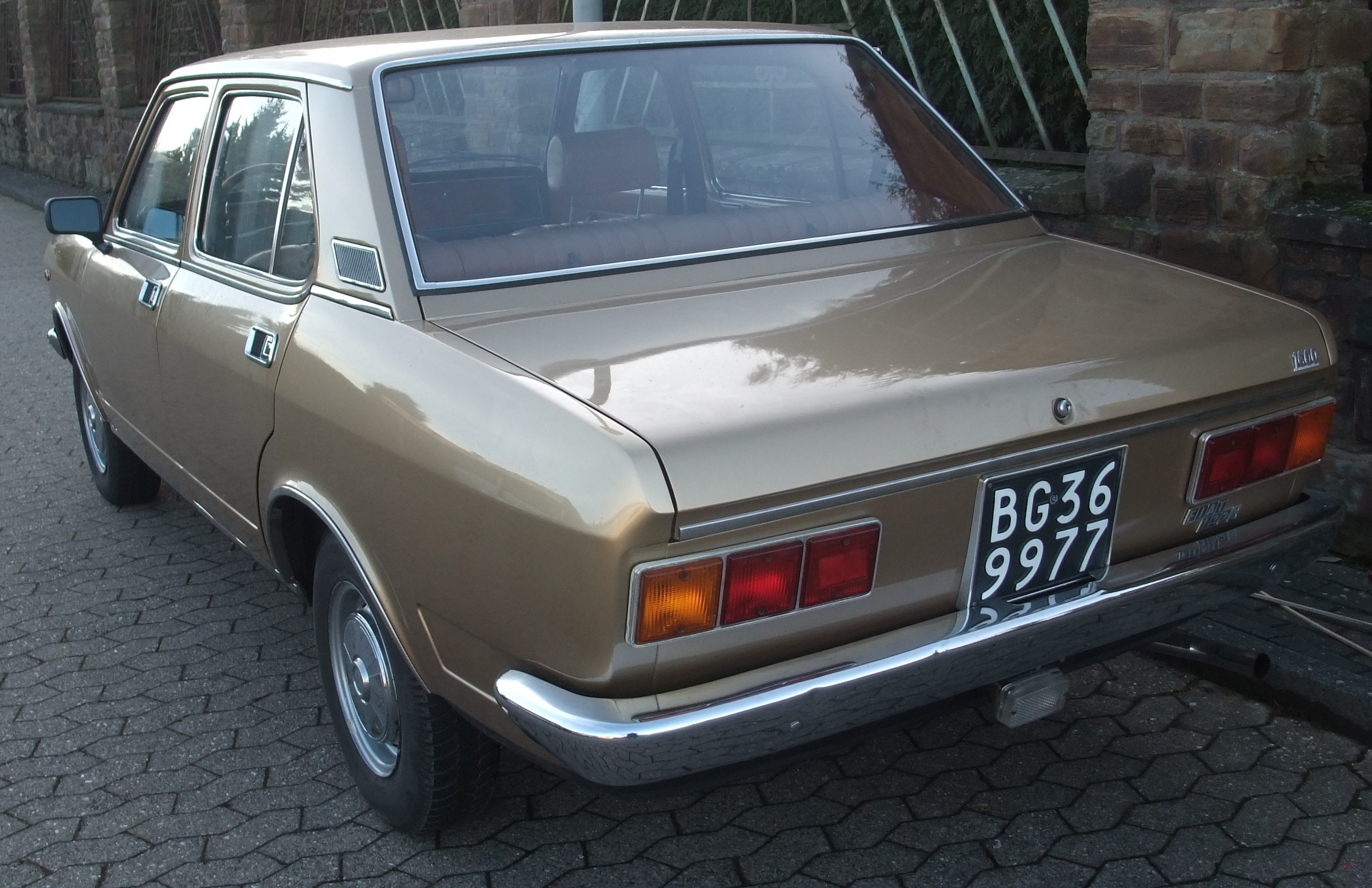 Fiat 132 erste Serie Heck